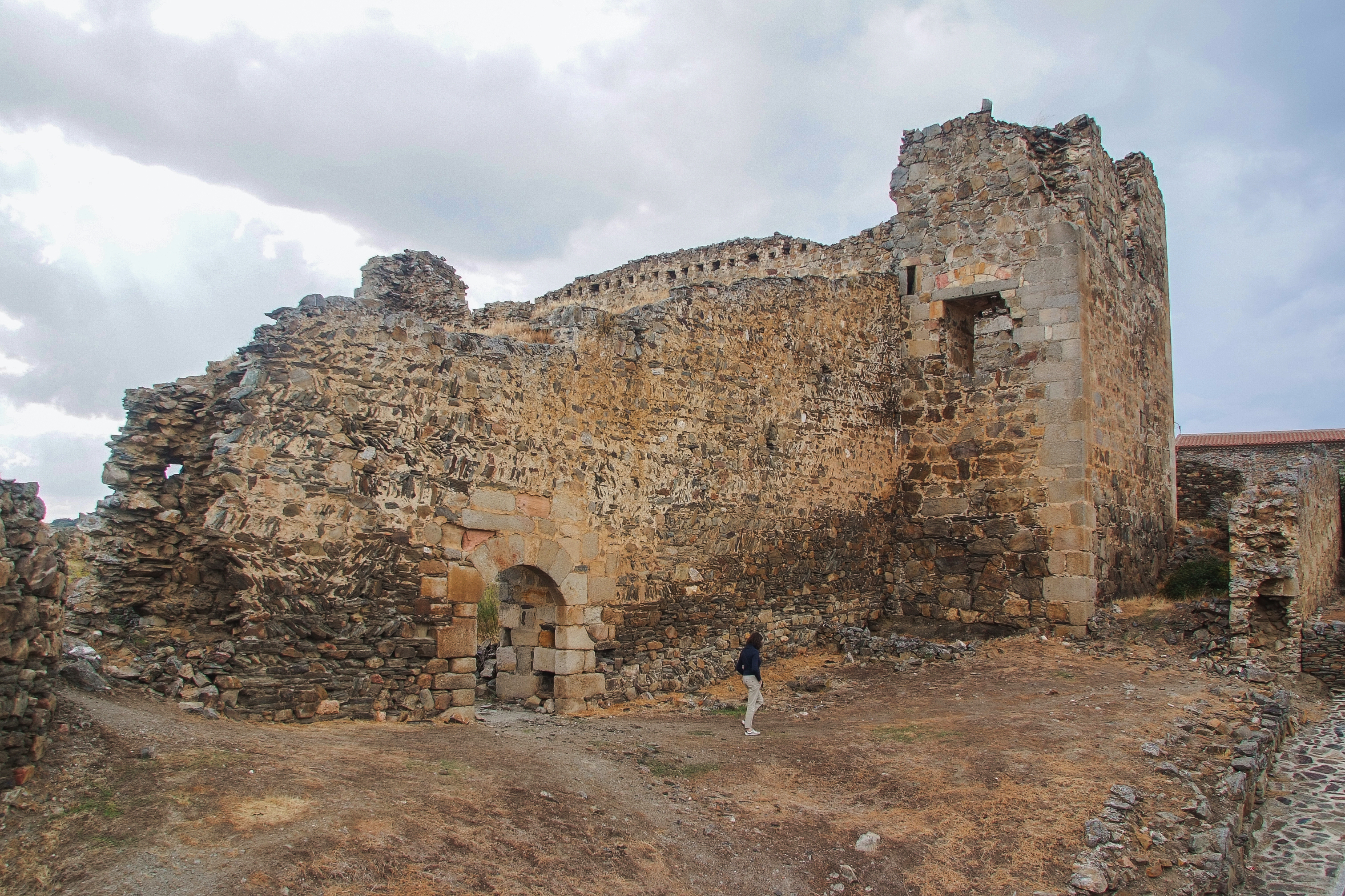 Ruinas del castillo de Salvatierra de Tormes (Salamanca; España)